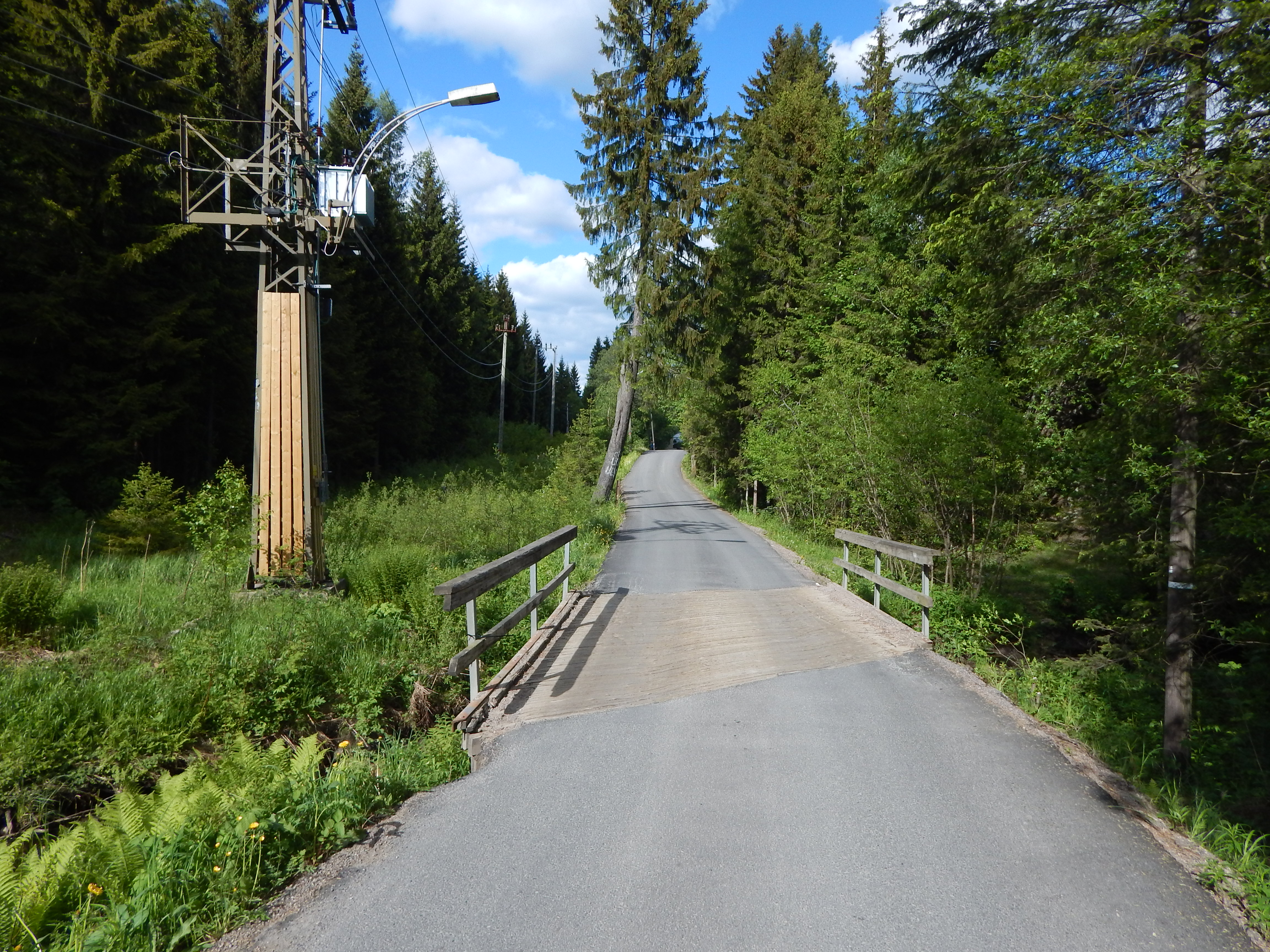 Movassbakken krysser Kvernbekken.